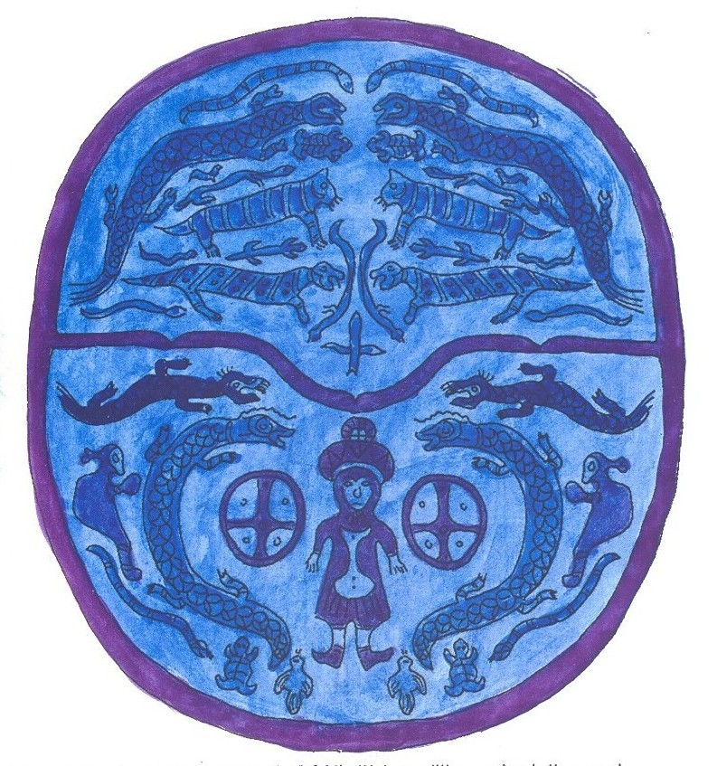 Festett szibériai sámándob állatfigurákkal díszítve